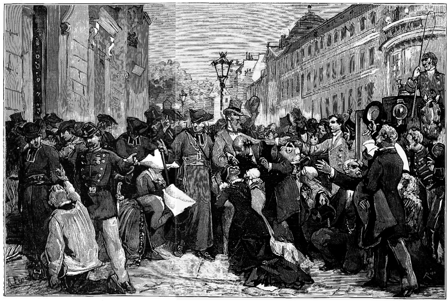 Réaction populaire à l'expulsion des jésuites, rue de Sèvres à Paris.